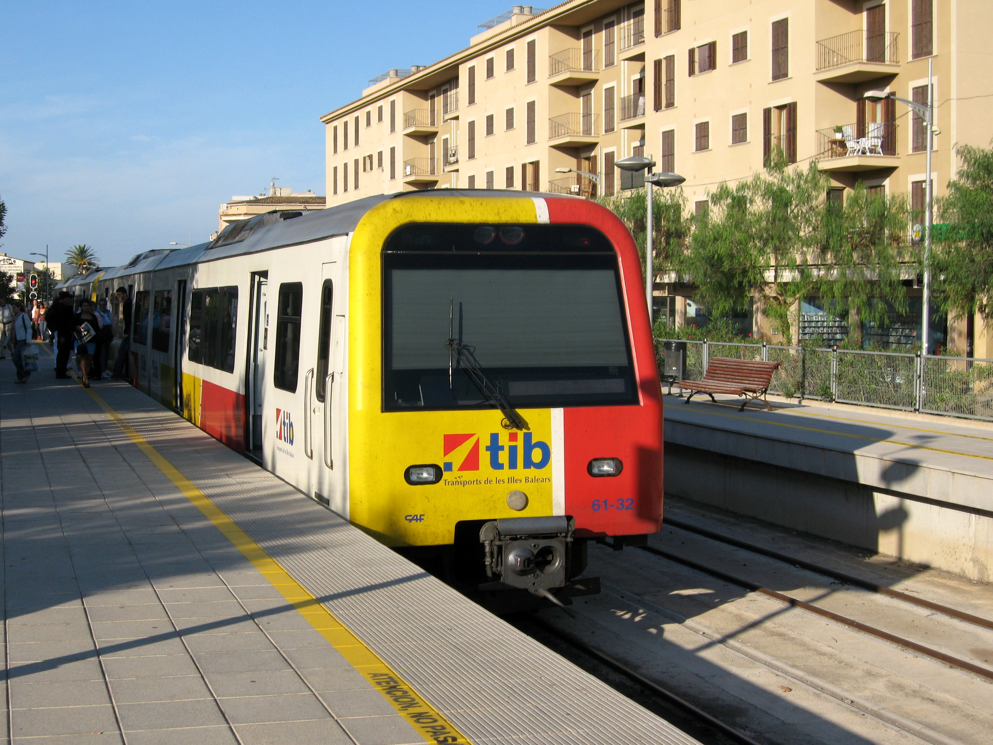 Bahnhof von Manacor, Mallorca, Spanien